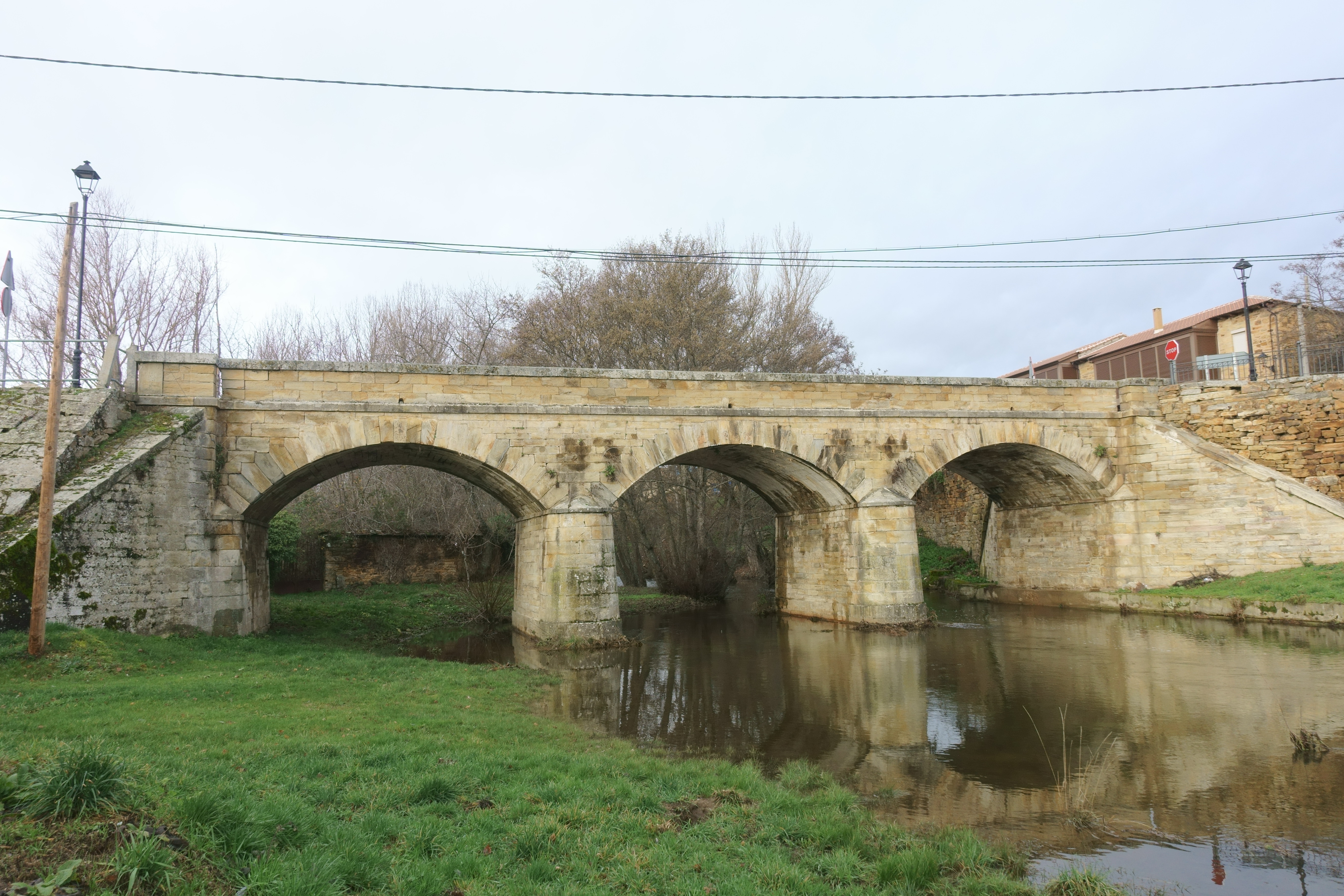 Puente sobre el río Turienzo, Santa Colomba de Somoza (León, España).